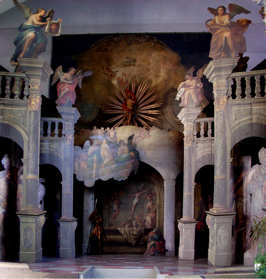 Altshausen: Heiliges Grab von 1783 (in der eigens errichteten Kapelle zur Ausstellung des Heiligen Grabes neben der Schlosskirche), Detail